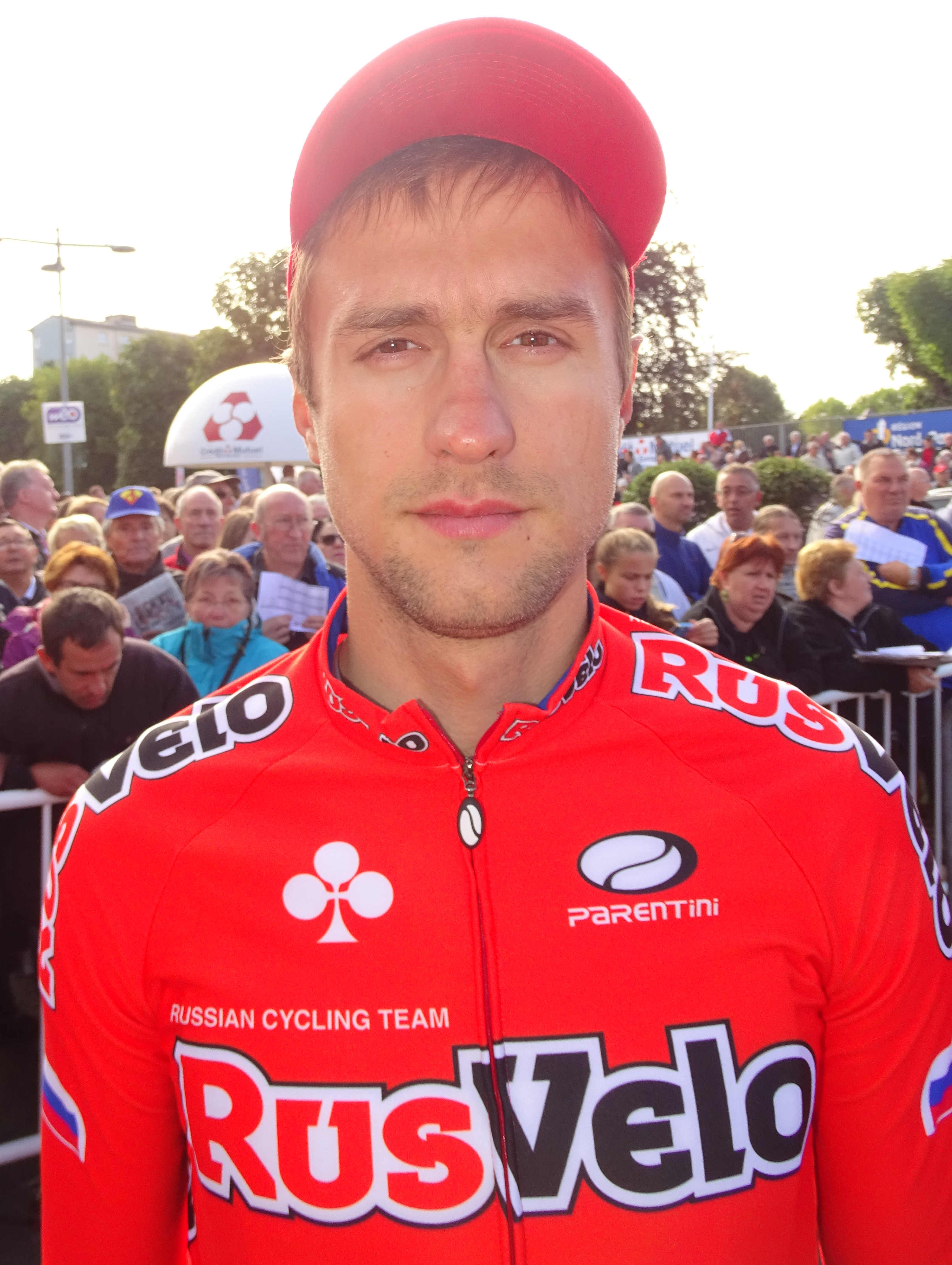 Reportage réalisé le dimanche 6 septembre à l'occasion du départ et de l'arrivée du Grand Prix de Fourmies 2015 à Fourmies, Nord-Pas-de-Calais, France.